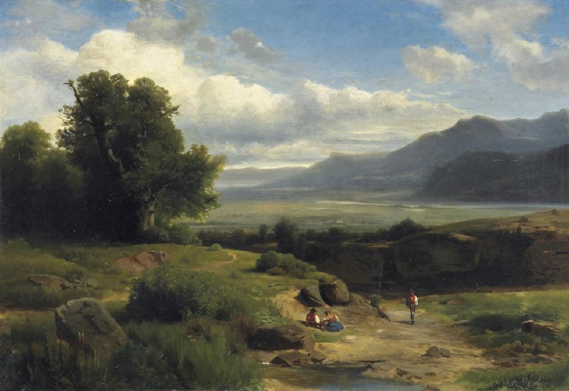 Am Wegesrand rastende Wanderer